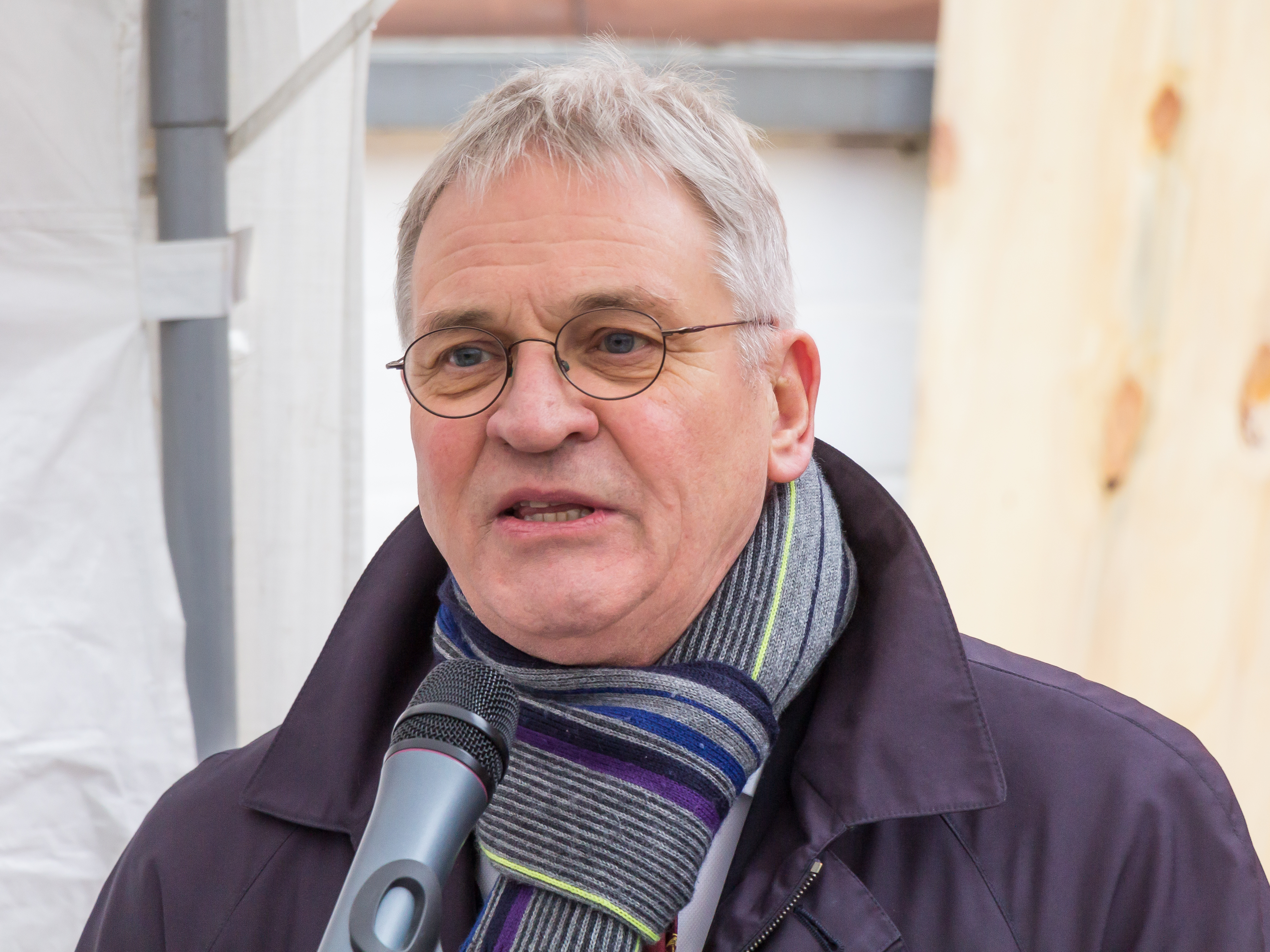 Restaurierung römische Wasserleitung aus Hürth Foto: Prof. Dr. Jürgen Kunow, Leiter des Amtes für Bodendenkmalpflege